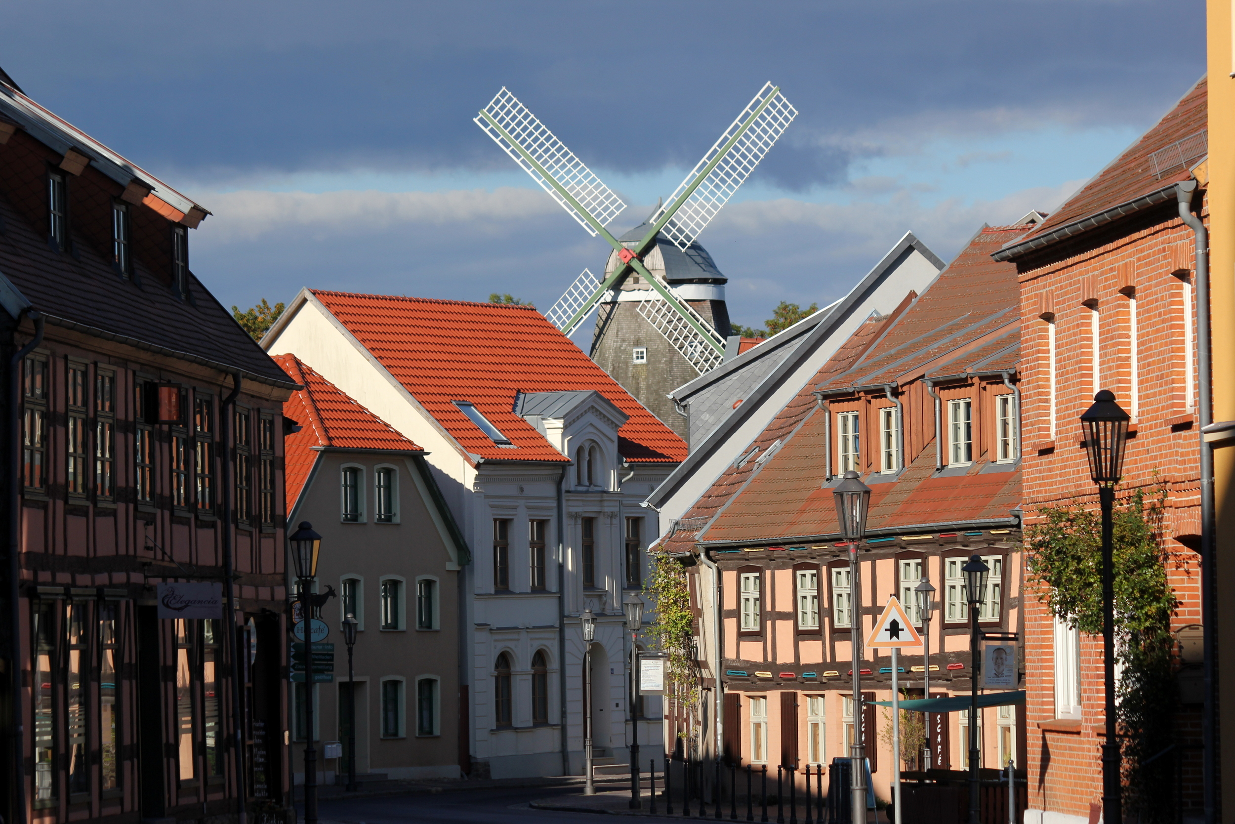 Hornjoserbsce: Stare město a wětrnik w Röbelu při Moricy, Mecklenburgsko-Předpomorska.